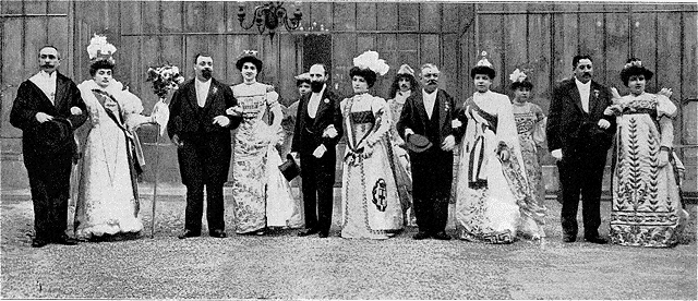 Dans la cour d'honneur du Palais de l'Élysée à Paris, de gauche à droite : Chevalier Piccini, Rosina Ferro-Pia Reine du marché de Porta Palazzo à Turin, Léon Brézillon, président du Comité des Fêtes de Paris, Jeanne Troupel Reine des Reines de Paris de la rive droite, Gandolfi, Maria Nulli Reine des marchés de Milan, Leroy, Pauline Toyer Reine des Reines de Paris de la rive gauche, Leray, Madame Mullier Reine des Marchés découverts de Paris.